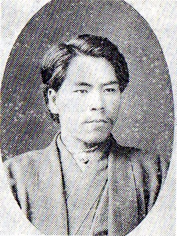 熊本バンドで同志社英学校出身の日本組合基督教会岡山教会牧師金森通倫